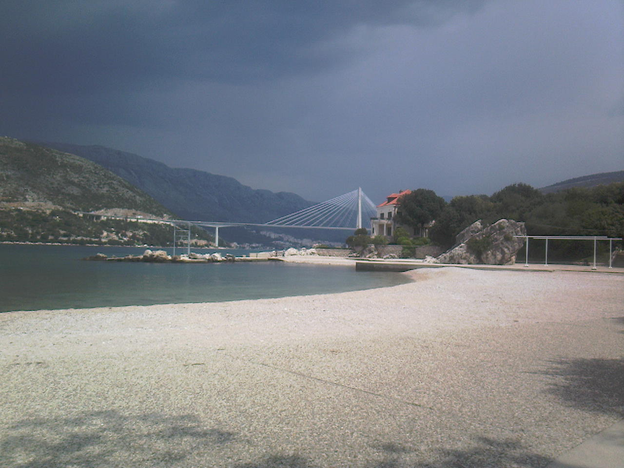 Copacabana je jedna od najljepših dubrovačkih plaža.